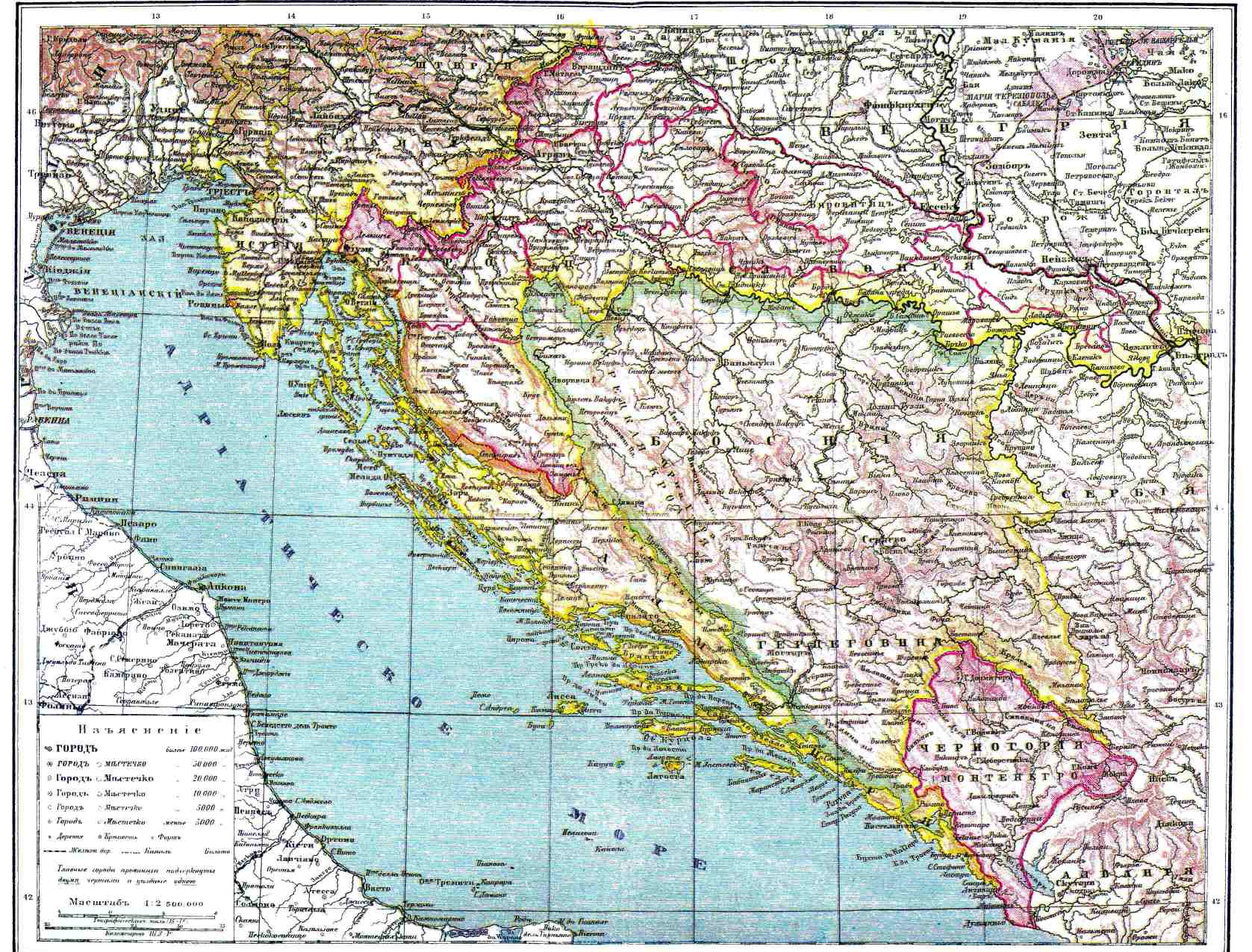 Карта Австро-Венгрии из энциклопедии Брокгауза и Ефрона